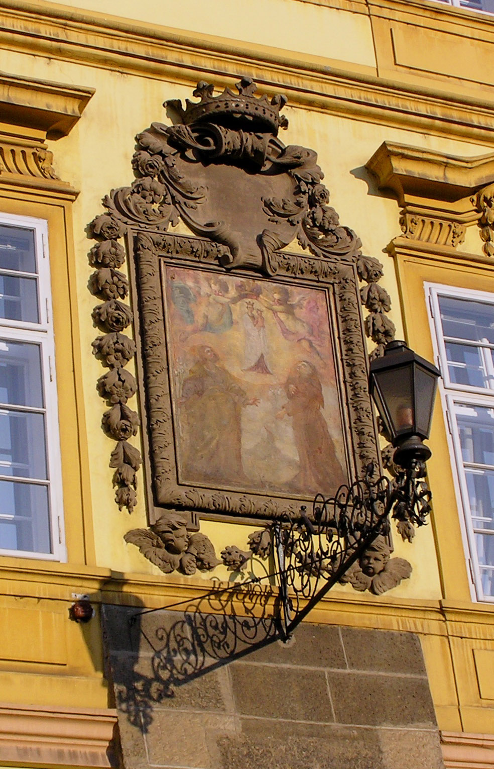 Šternberský palác, Praha, Malostranské náměstí čp. 7, Obraz Nanebevzetí Panny Marie